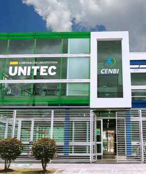 Fachada de sede unitec